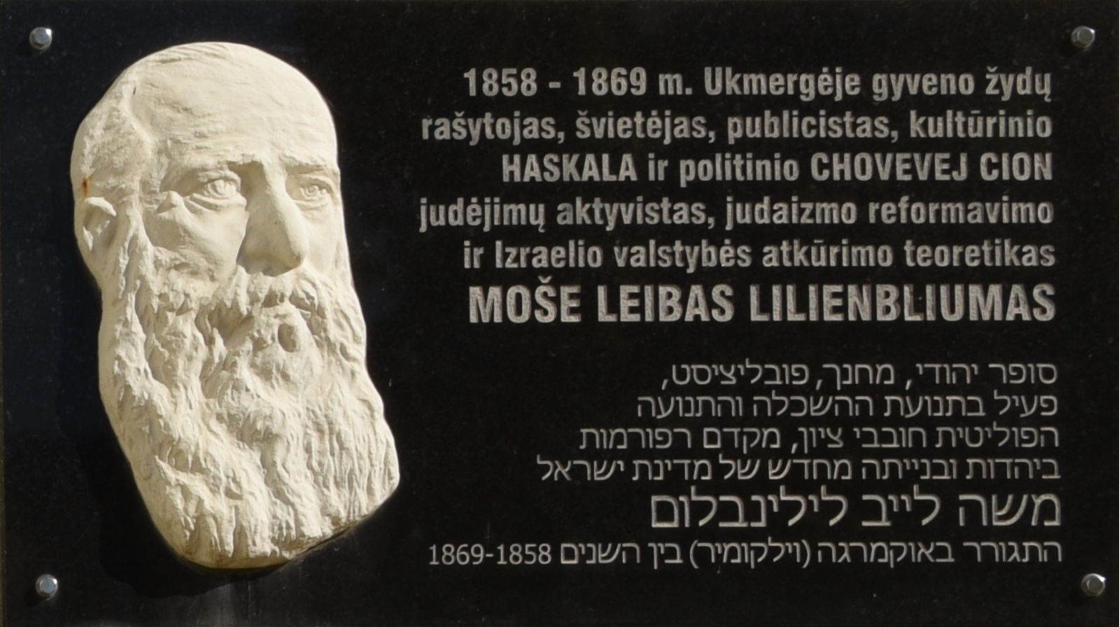 Gedenktafel für Mose Leibas Lilienbliumas